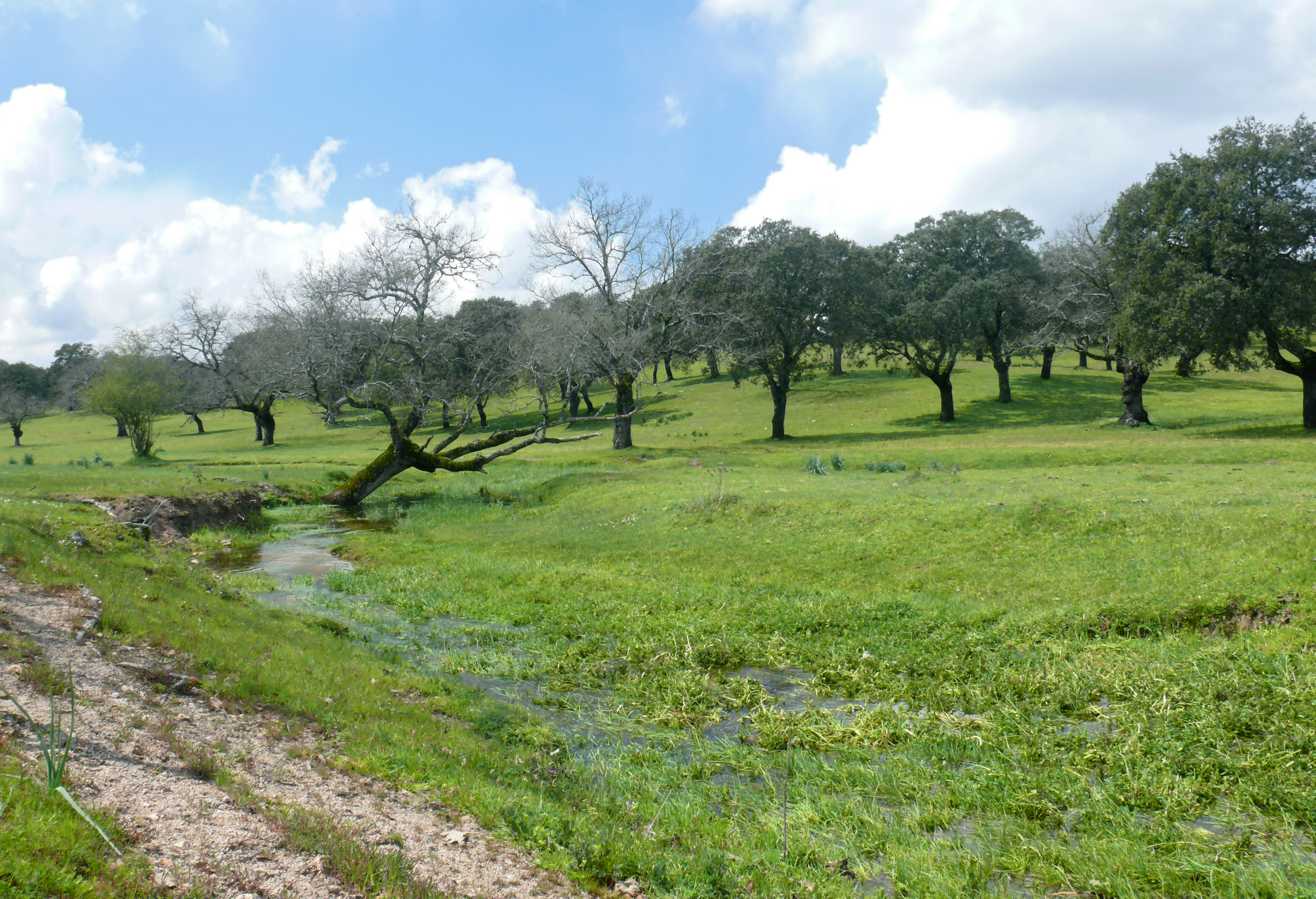 Dehesa, Cardeña, Parque natural